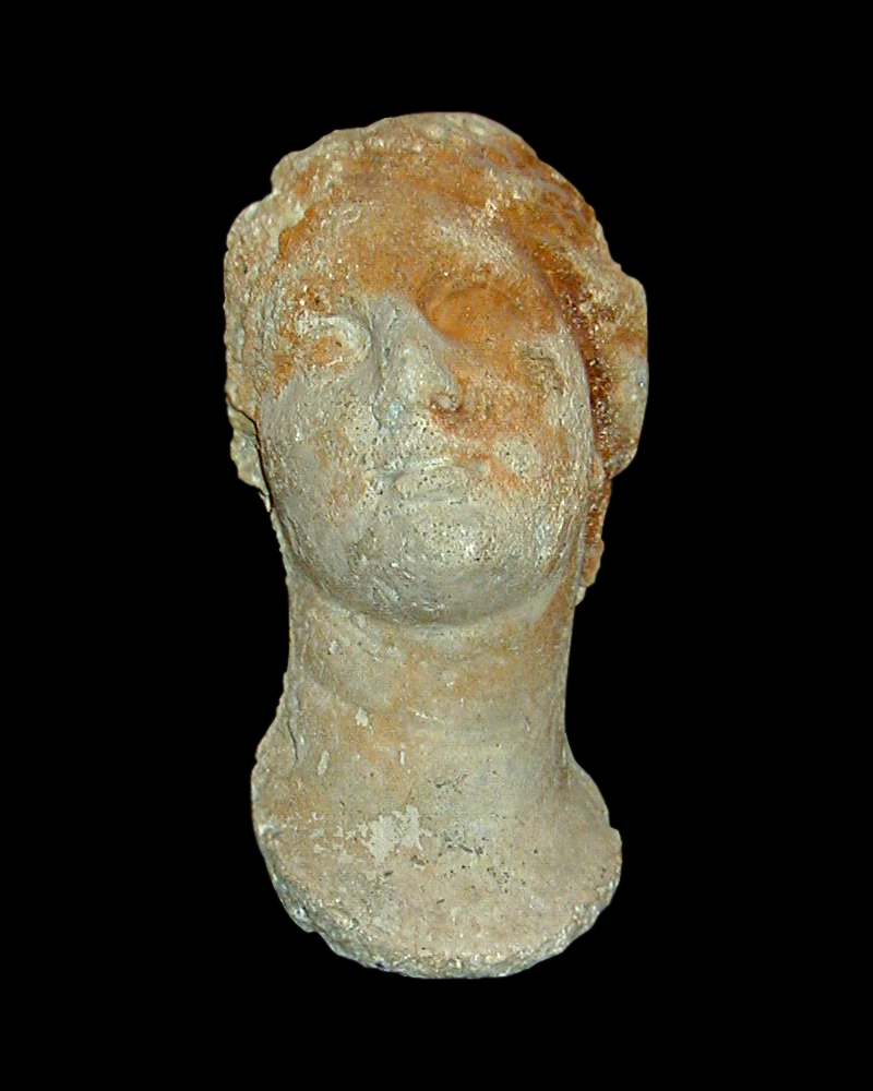 Buste au musée du Bardo, fouilles de Mahdia